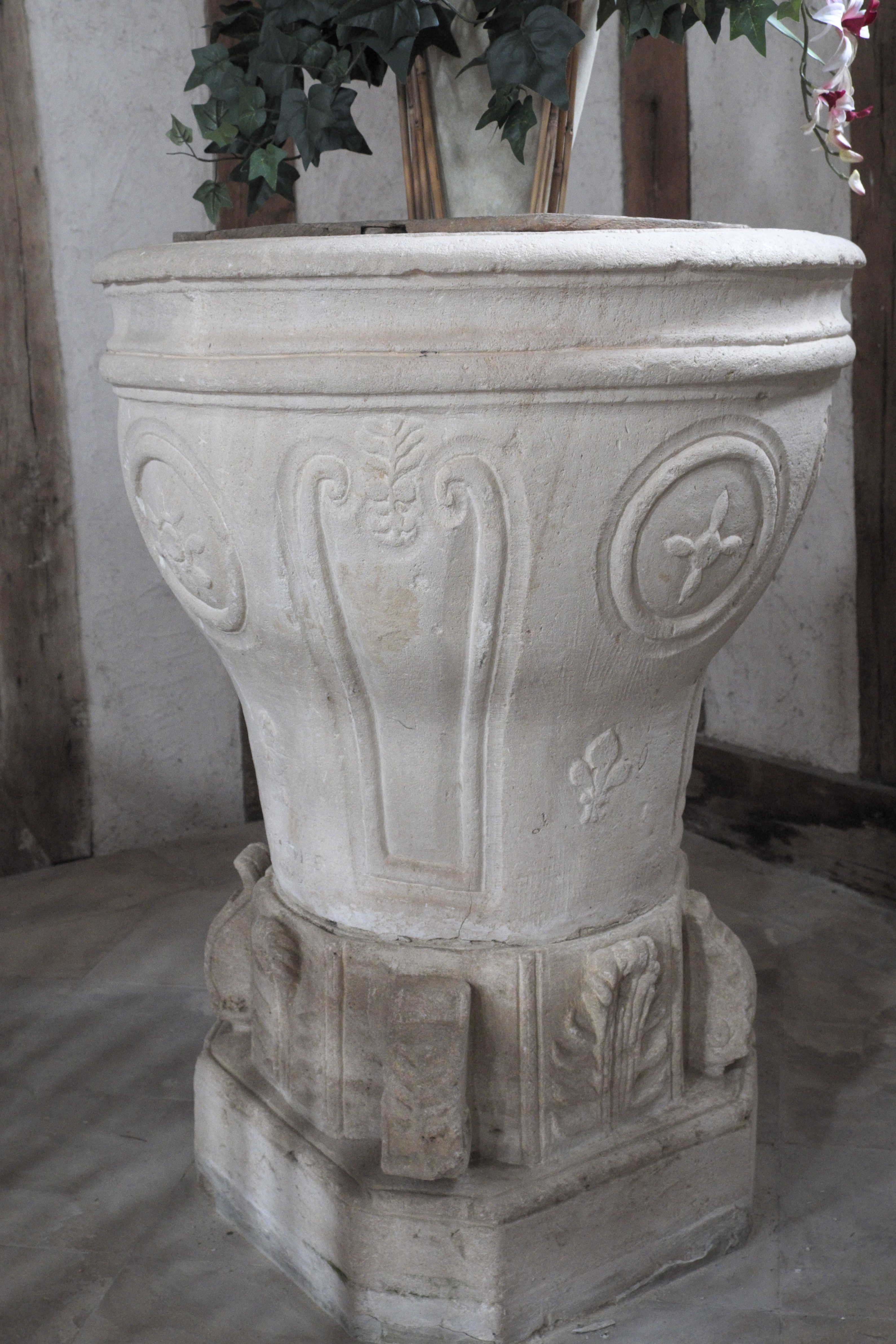 Katholische Kirche Saint-Jacques-et-Saint-Philippe in Lentilles im Département Aube (Champagne-Ardenne/Frankreich), Taufbecken von 1779